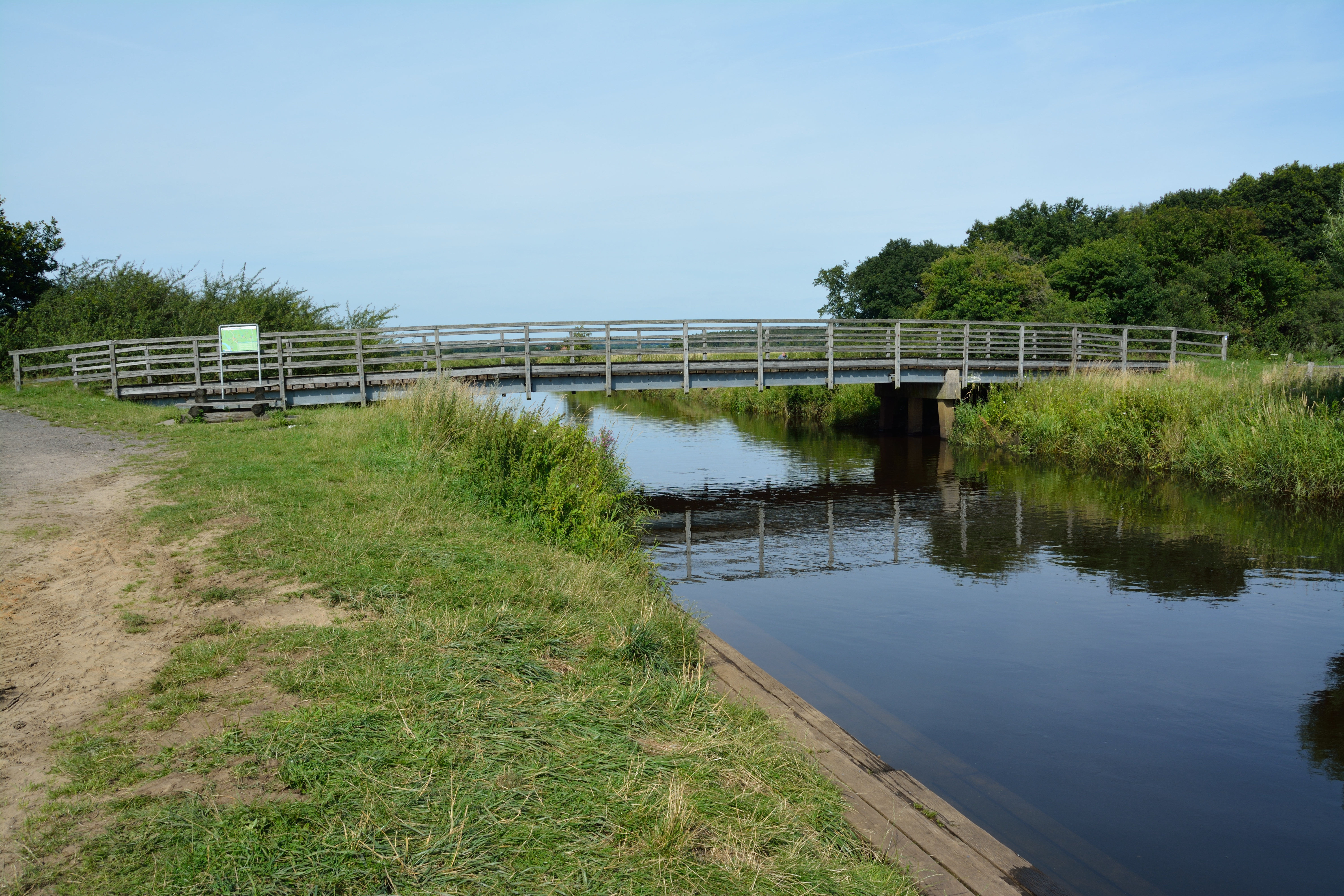 Impressionen der Störbrücke in Rosdorf